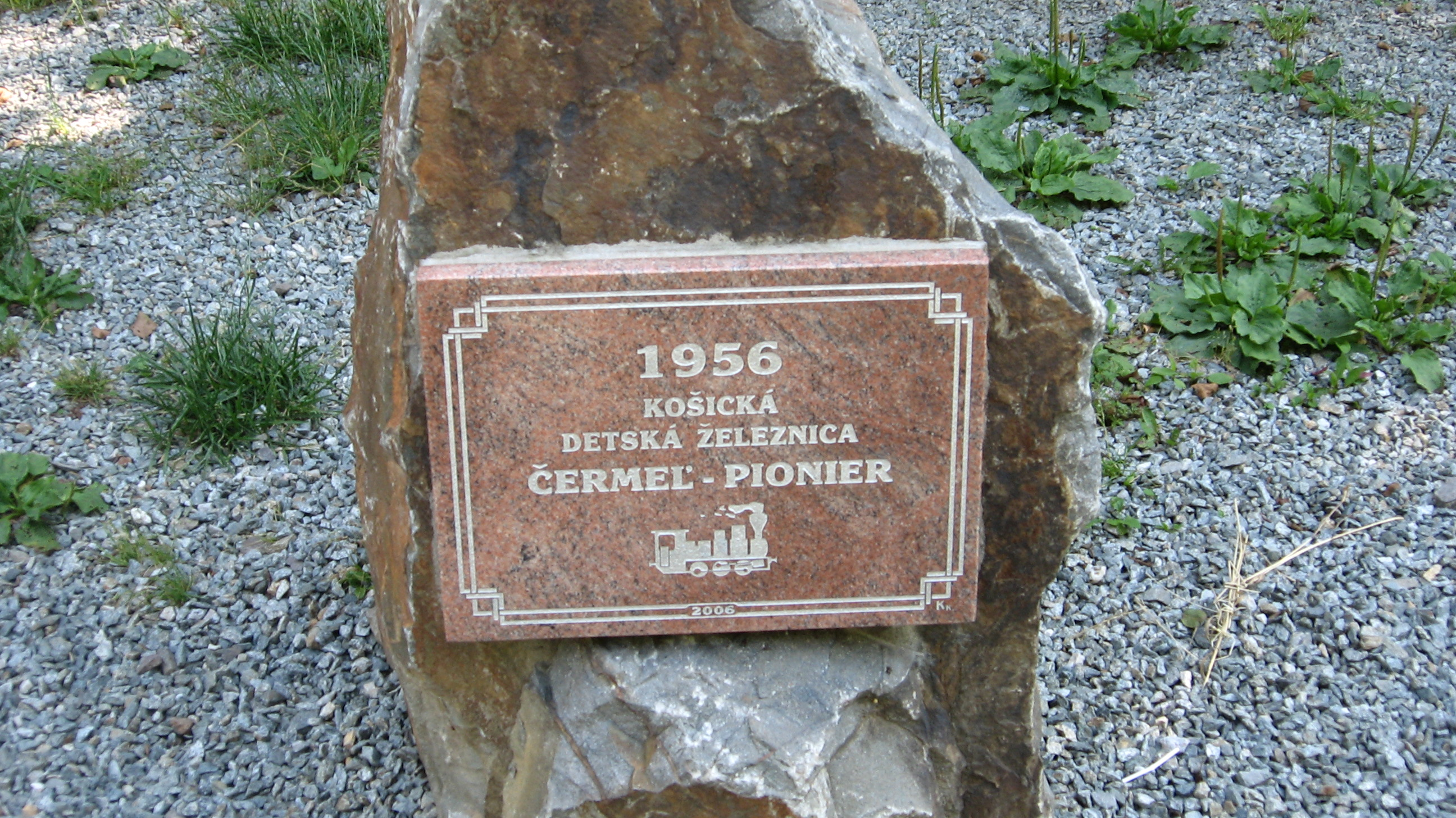 Tabuľka u Čermeľskej železničky. Informačná tabuľa.